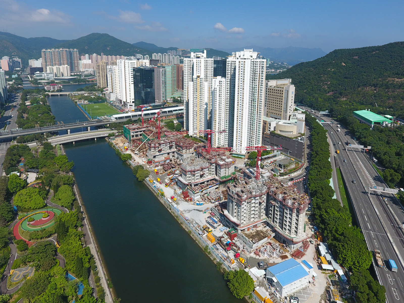 Shek Mun